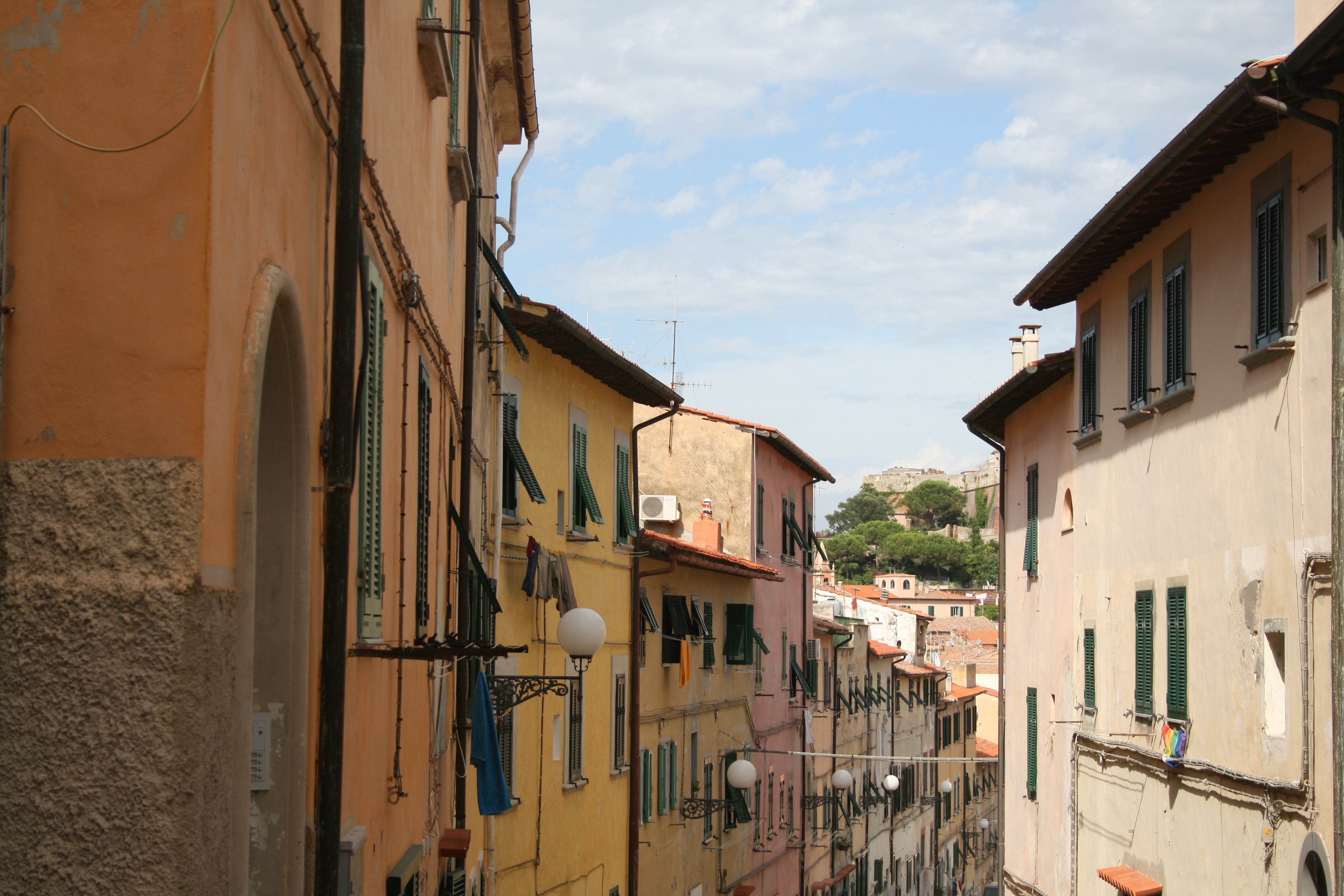 Vicolo di Portoferraio